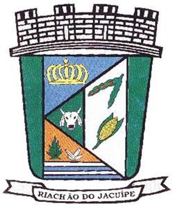 Riachão do Jacuipe